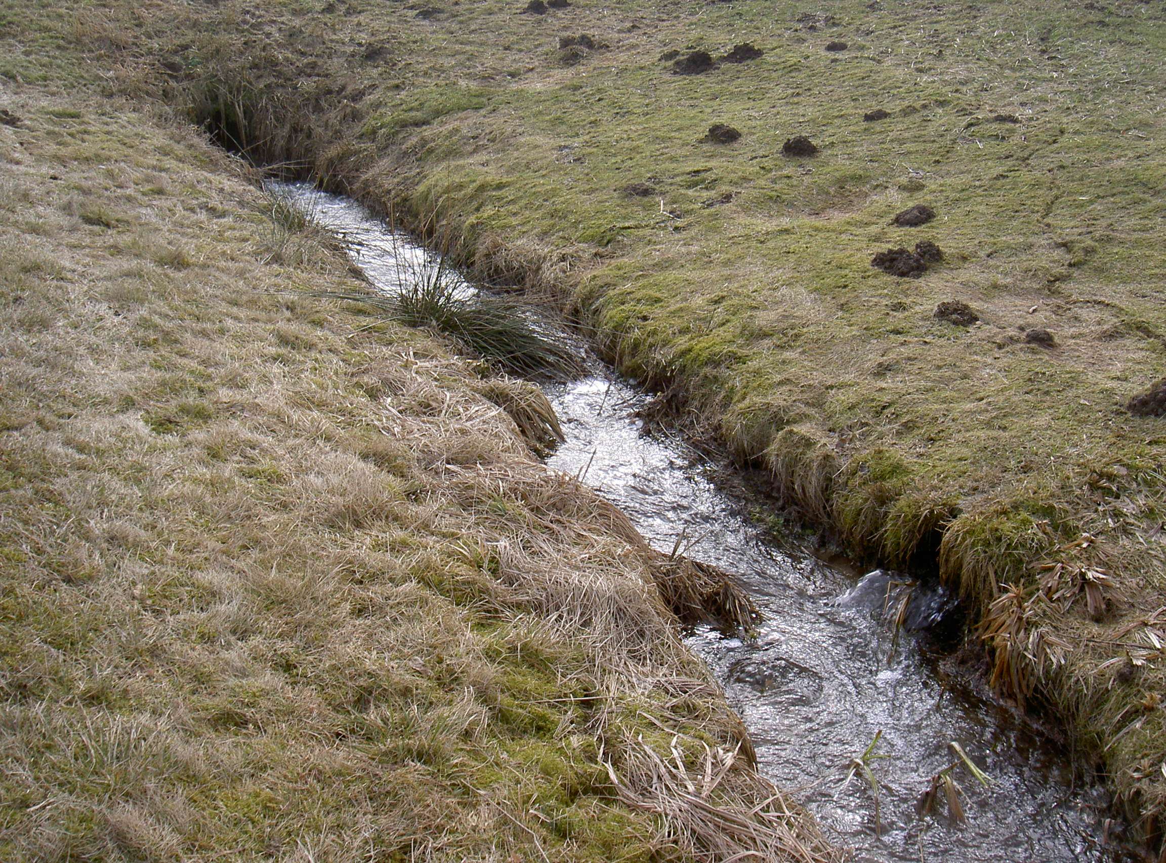 Steinbach (Murach) Quelle